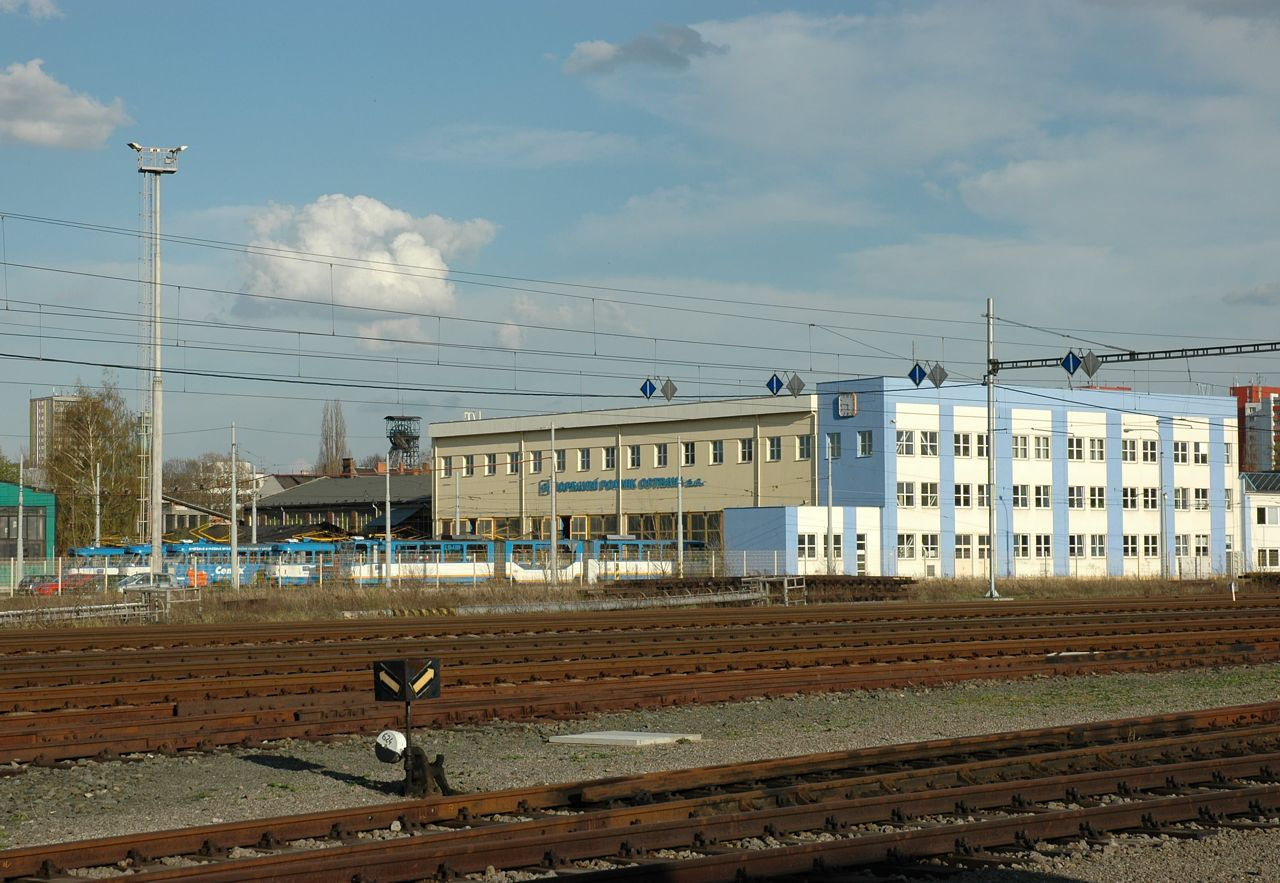 Tramvajová vozovna Moravská Ostrava (Křivá)